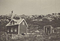 Bildet viser hytten med kallenavnet "Flammen."